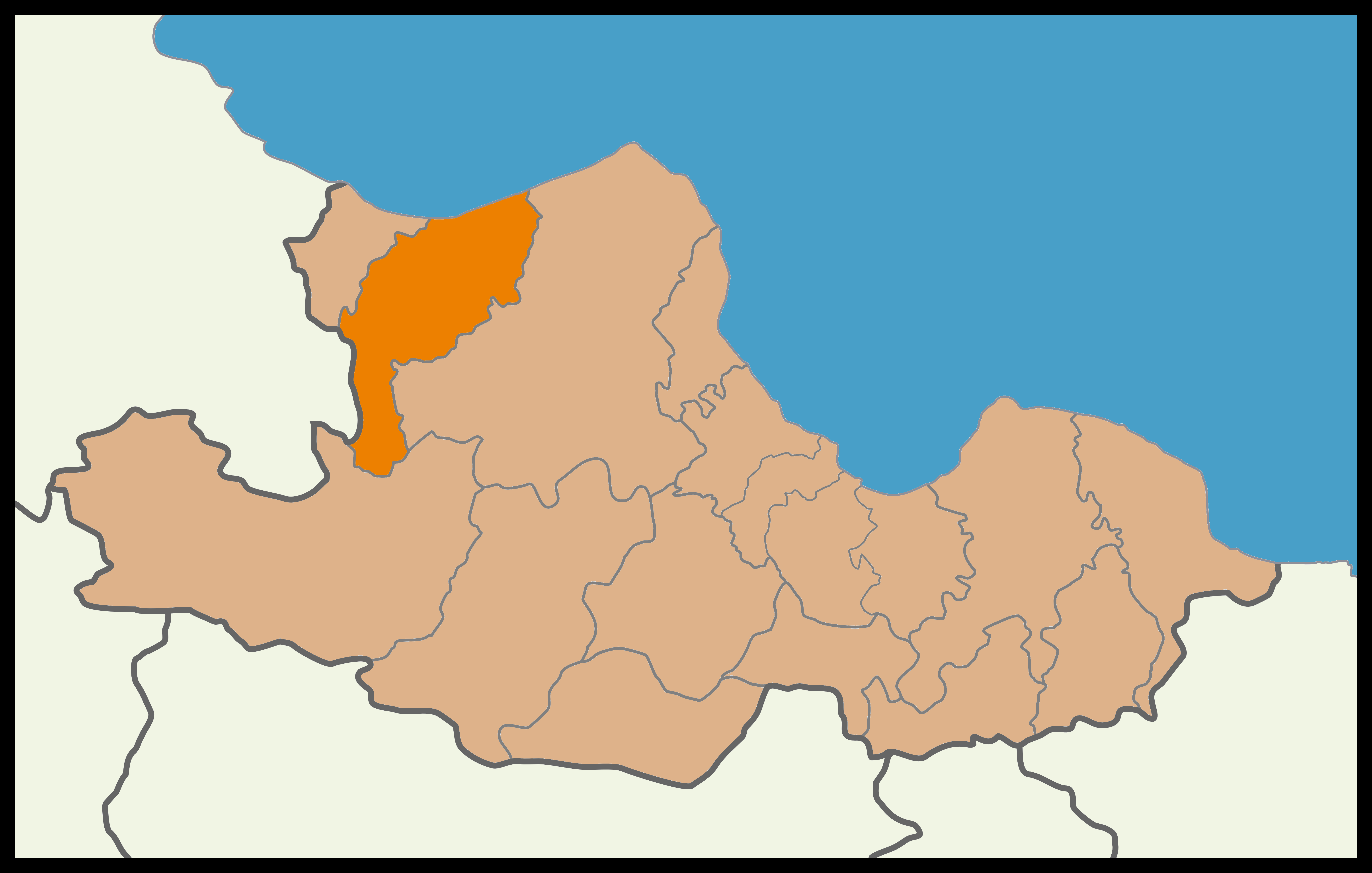 Samsun'un Ondokuzmayıs ilçesinin 2015 Türkiye genel seçimleri haritası.